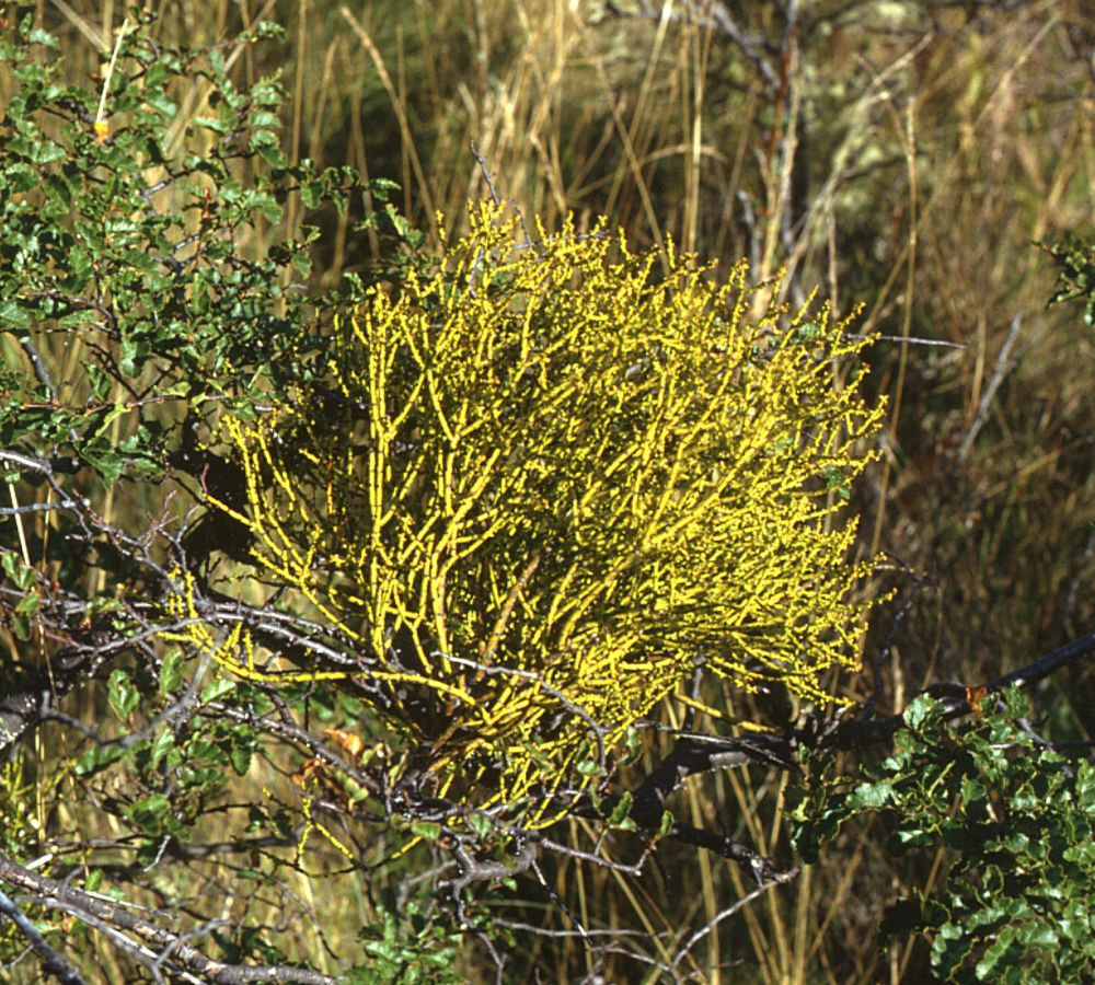 Misodendrum punctulatum, (Misodendraceae), parasitisch auf Nothofagus antarctica - Chile, Patagonien/Patagonia, Parque Nacional Torres del Paine, bei Posada Río Serrano